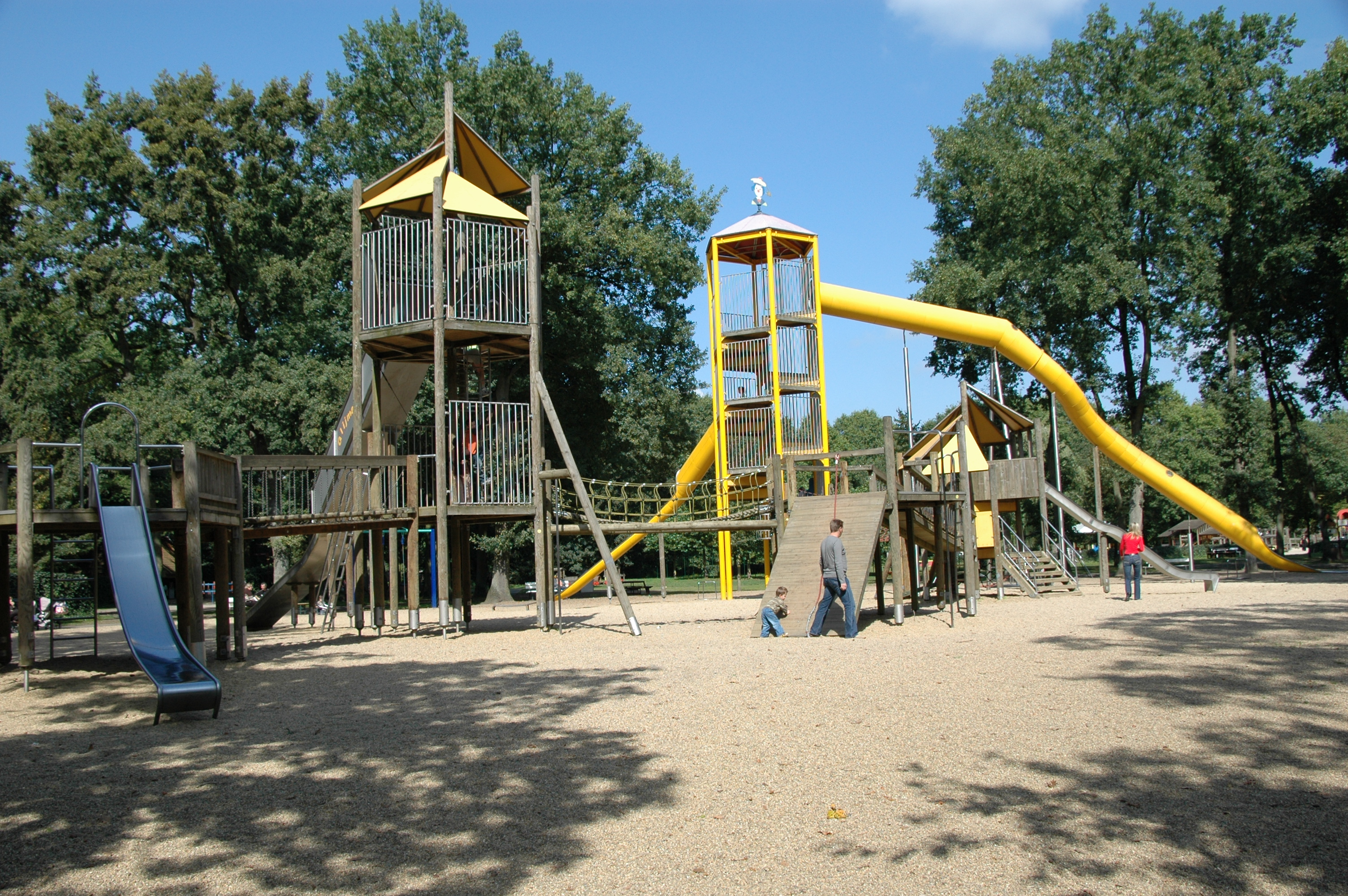 Speeltuin van Bokrijk, Domein Bokrijk, één van de grootste openluchtspeeltuinen van België, deels in een bos geplaatst.